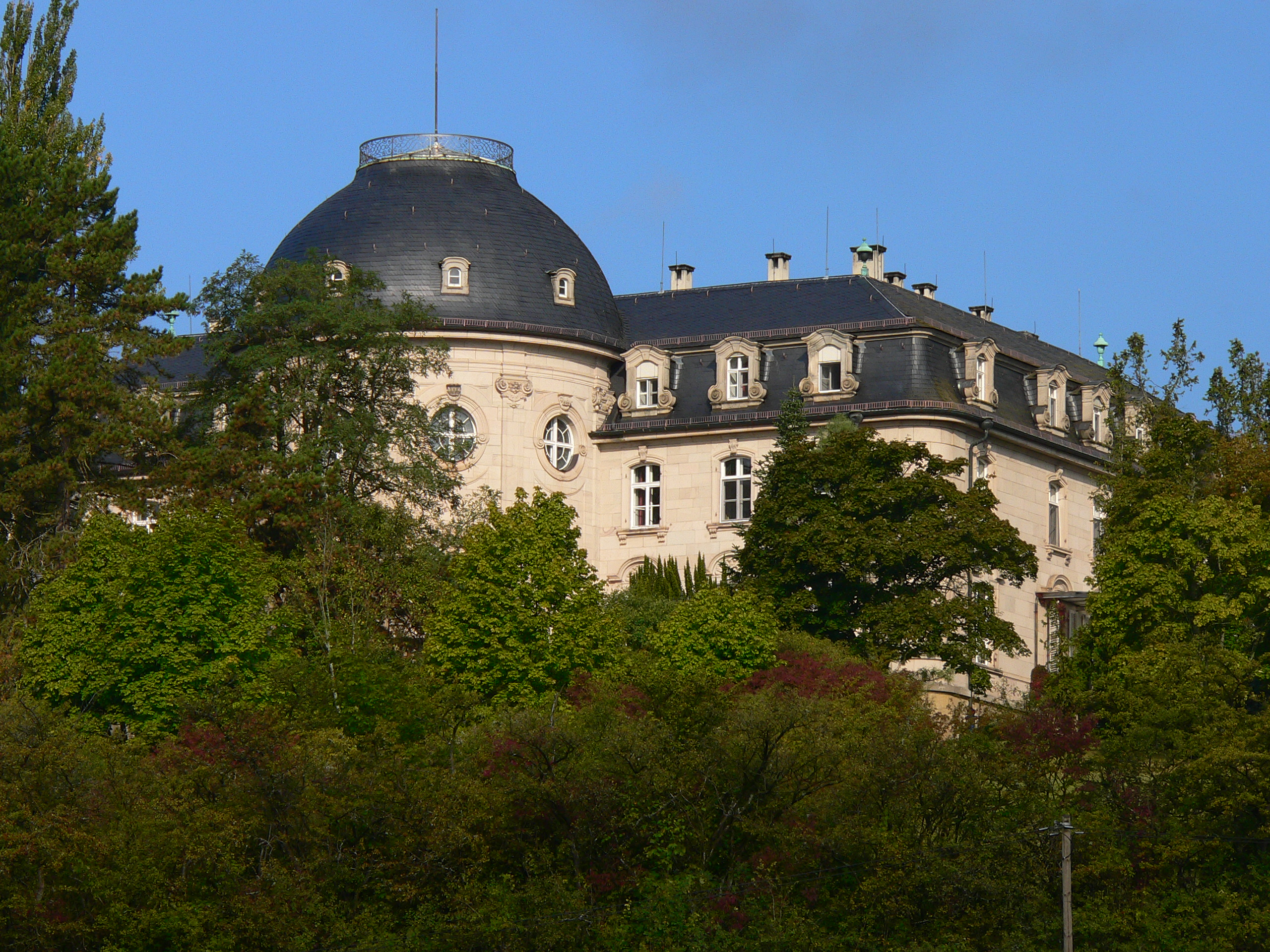 Schloss Craheim bei Wetzhausen in Bayern, Regierungsbezirk Unterfranken, Landkreis Schweinfurt